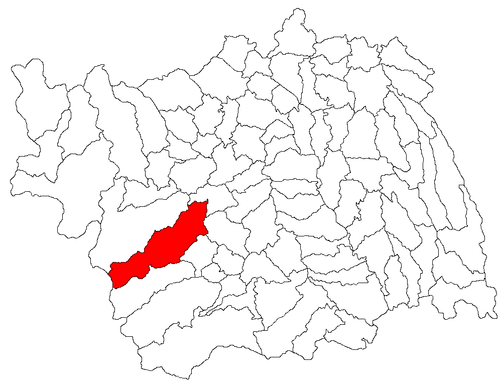 Categorie:Hărţi ale judeţului Bacău